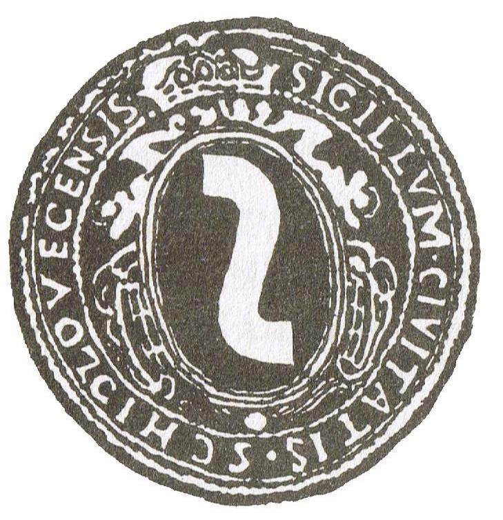 Pieczęć miejska Szydłowca